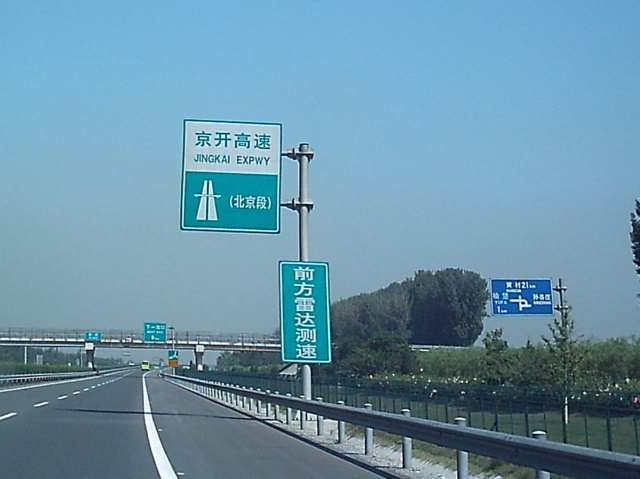 高速公路起点标志 (DF08 (中文) 2004年图片)